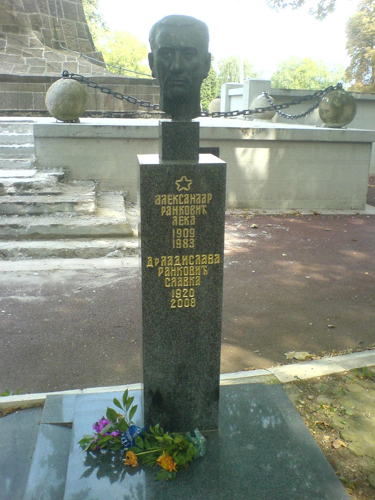 Grob Aleksandra Rankovića